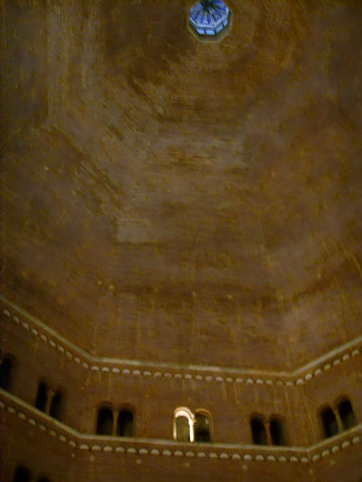 Cremona, battistero, interno